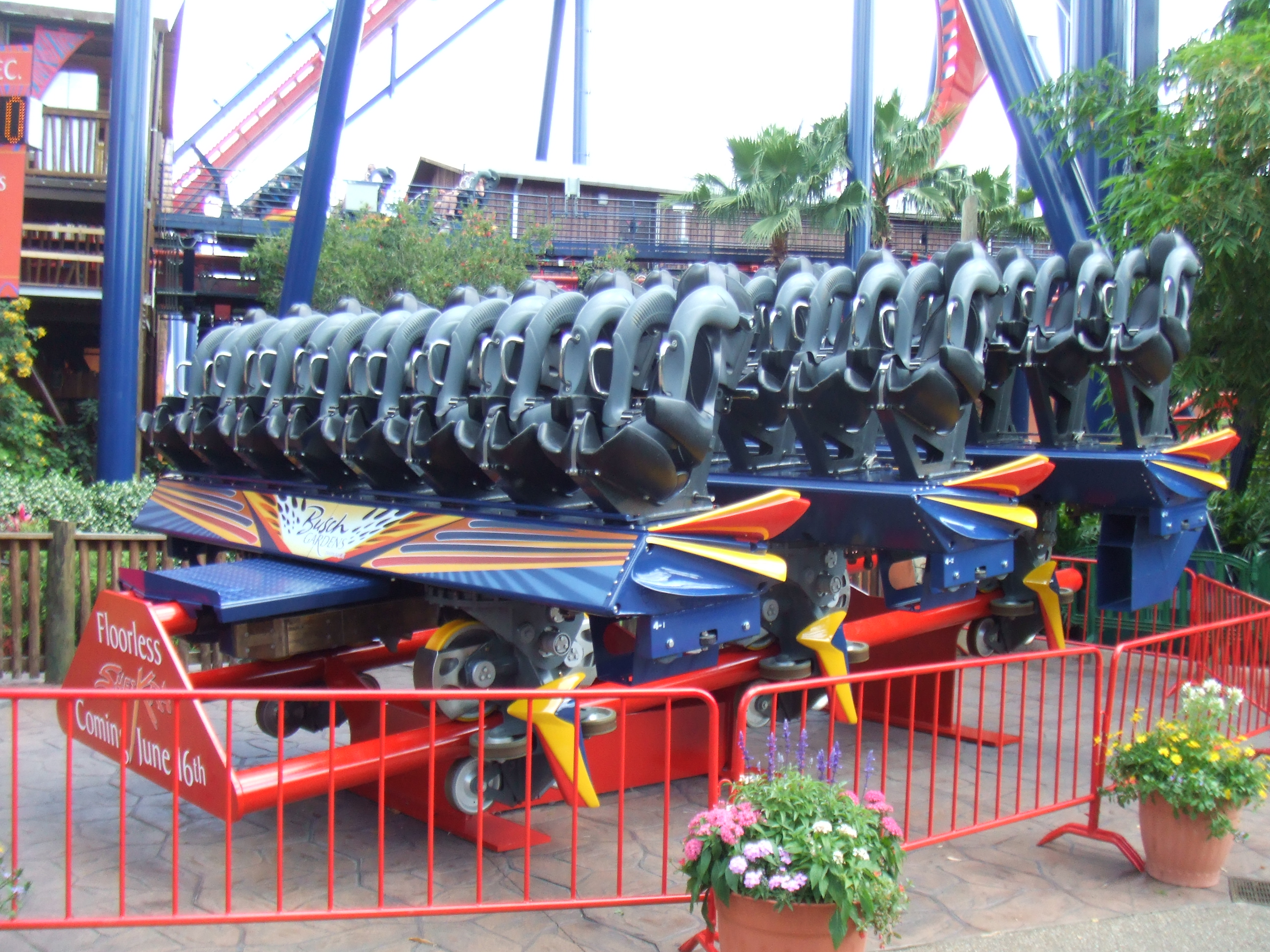 SheiKra , montagnes russes à Busch Gardens Africa